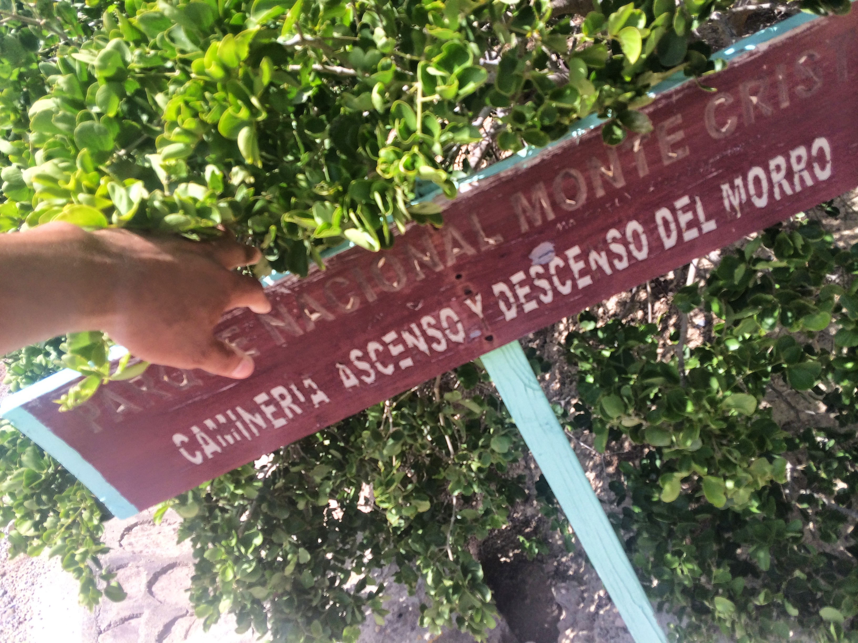 Monte Cristi Province, Dominican Republic